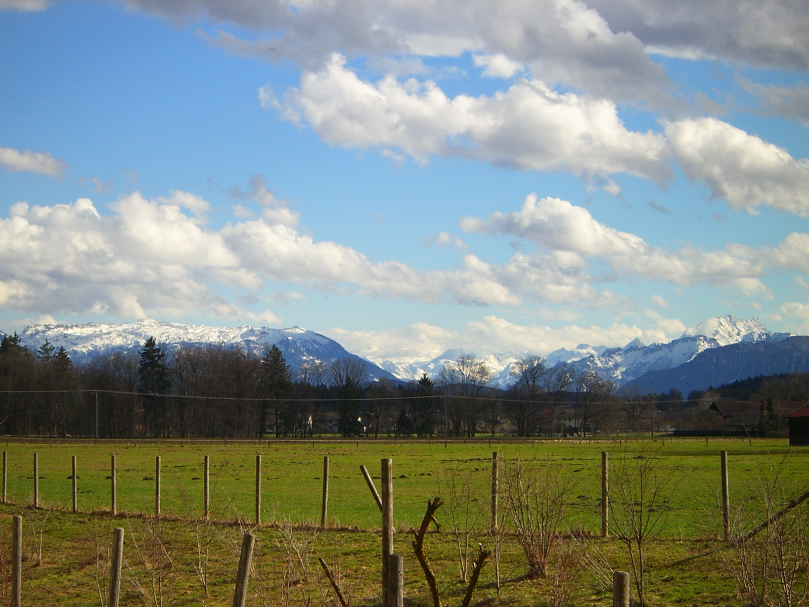 Blick auf Kirchanschöring und die Alpen im Sommer